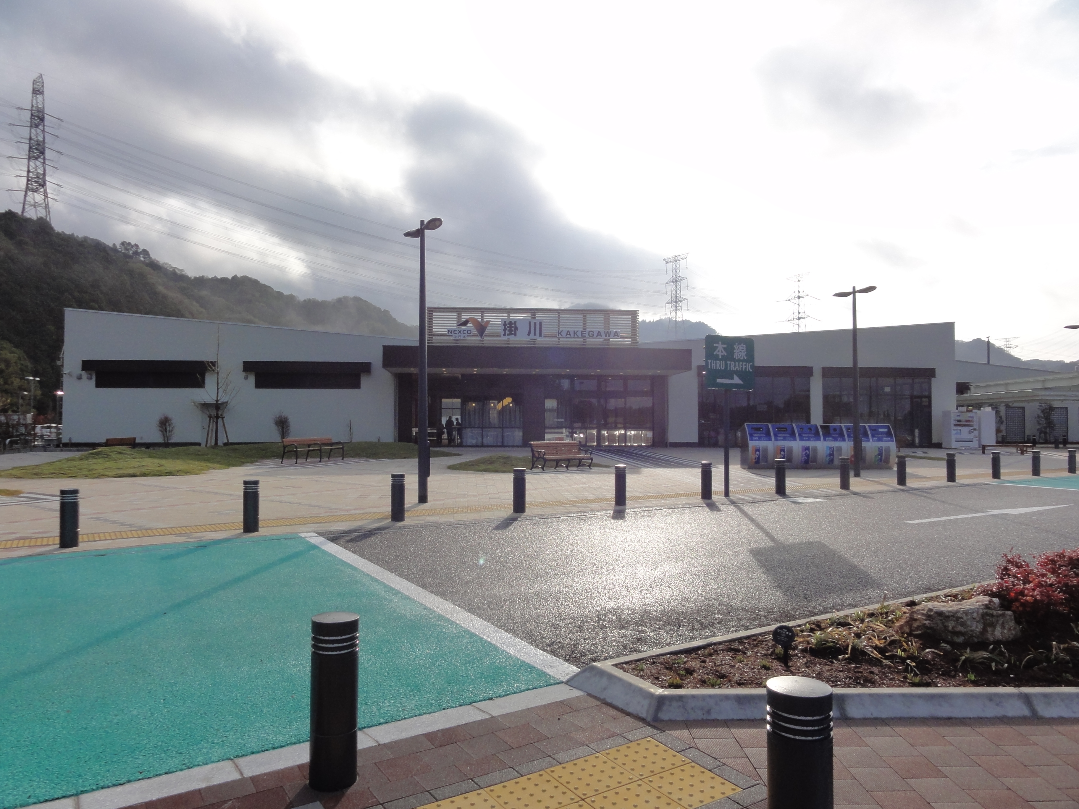 新東名高速道路 掛川PA 上り線施設